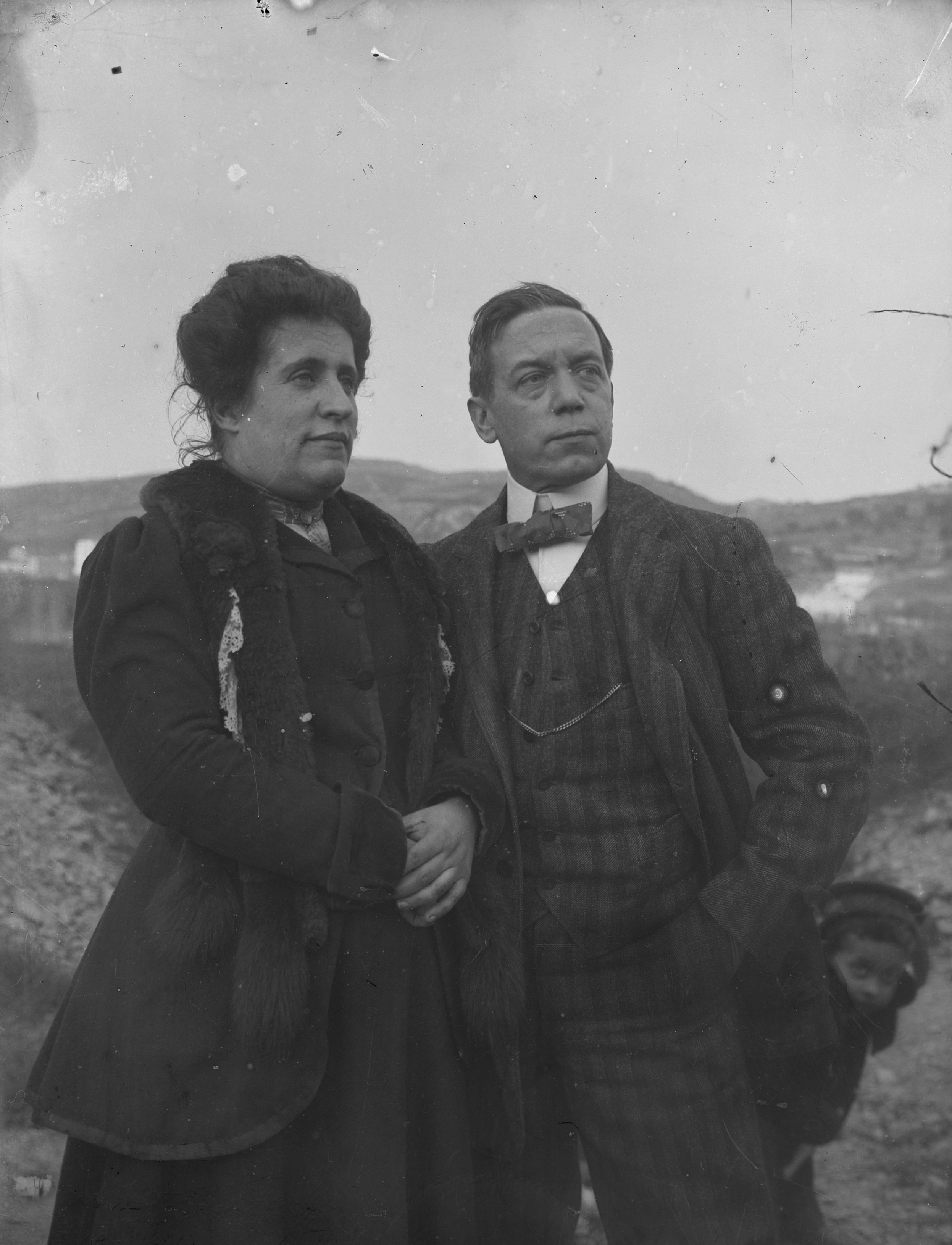 Retrat de Lleó Audouard Deglaire i la seva esposa Aurèlia Vela Vivó.